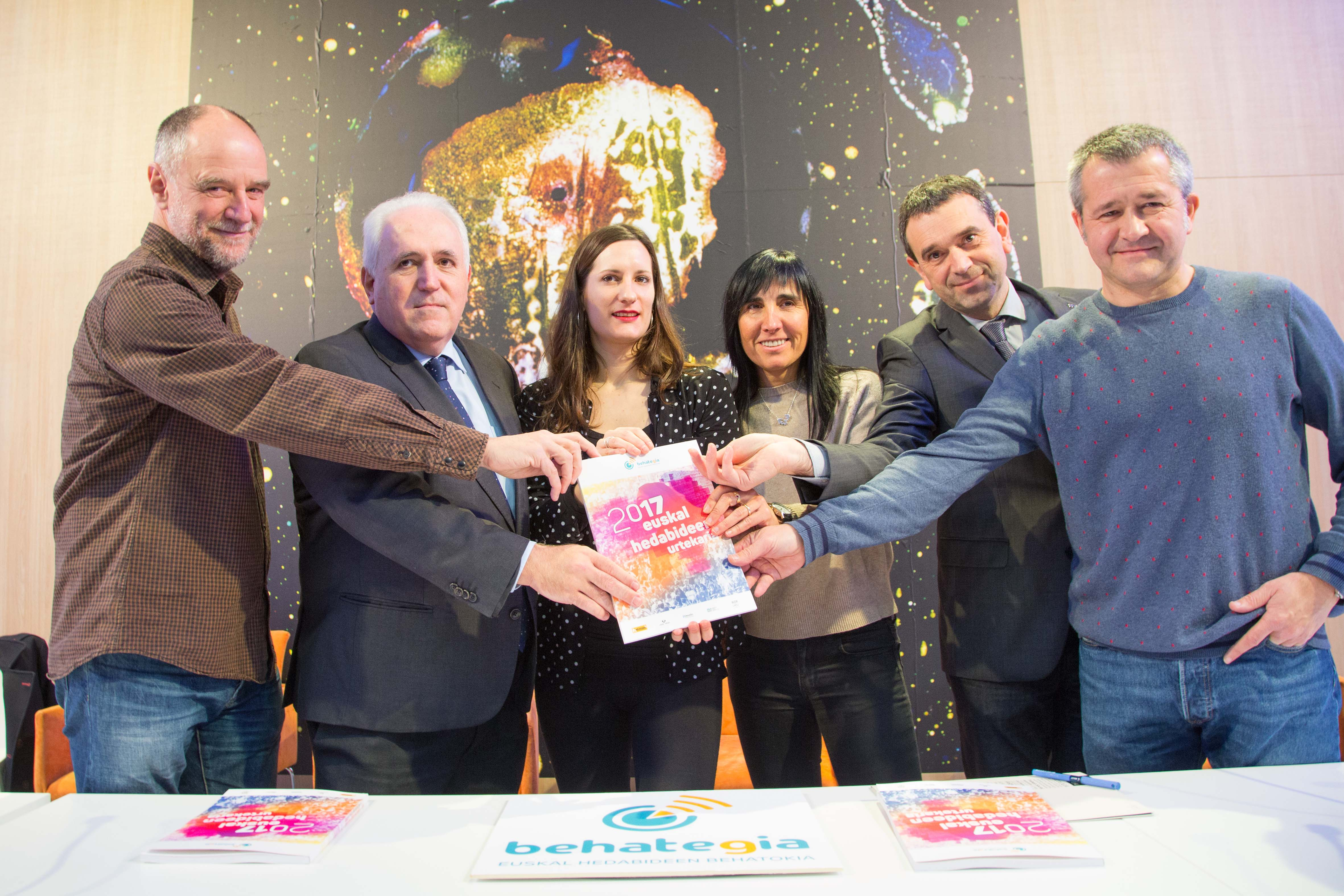 Durangon 2017-12-07, Euskal Hedabideen Behategiaren urtekariaren aurkezpena. Hekimen Euskal Hedabideen elkartea, UPV/EHU, Deustuko Unibertsitatea eta Mondragon Unibertsitatea izan dira, orainarte, Behategia osatu duten erakundeak, eta Udako Euskal Unibertsitatea batuko zaioorain